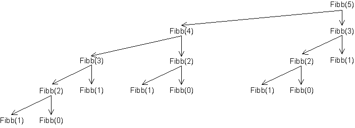 pseudocode fibbonacci (implémentation récursive naïve)